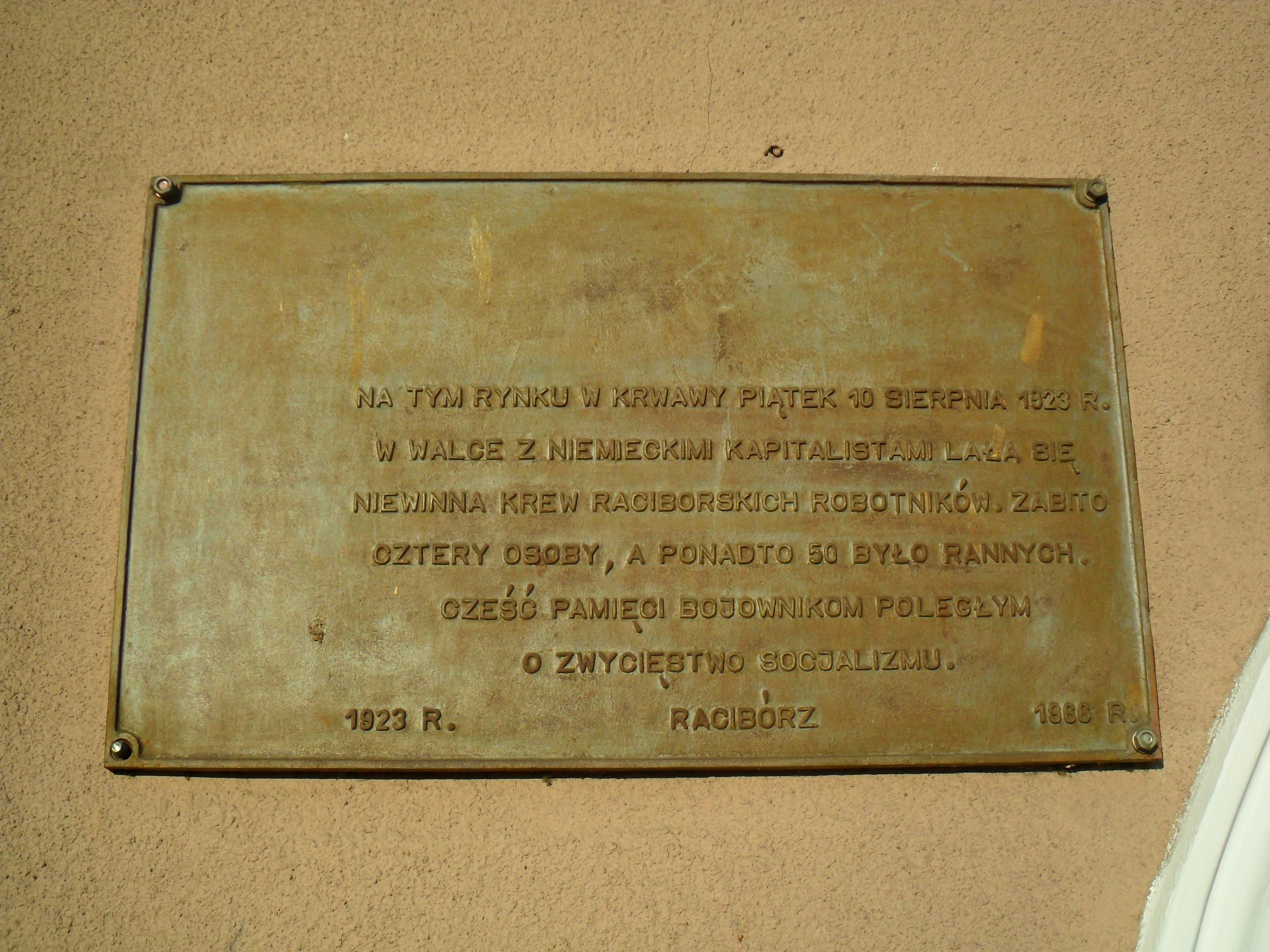 Tablica na rynku w Raciborzu z 1966 roku upamiętniająca strajk robotników z 10 sierpnia 1923 roku.